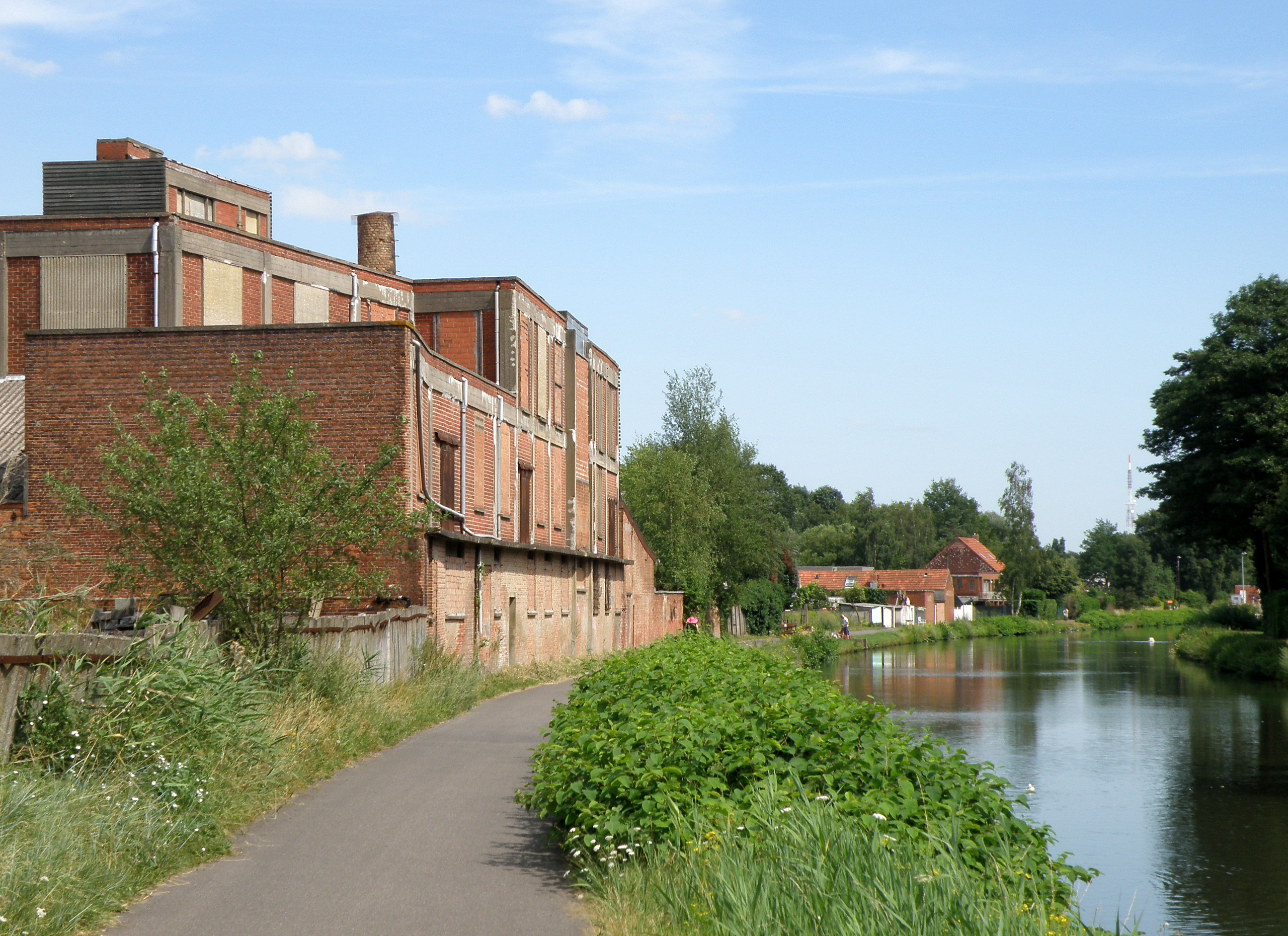 Kanaal Dessel-Turnhout-Schoten. Bocht van het kanaal nabij sluis 8 in Schoten.